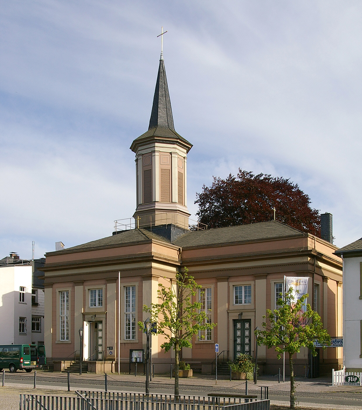 Evangelische Auferstehungskirche am Neumarkt, Arnsberg, Nordrhein-Westfalen.